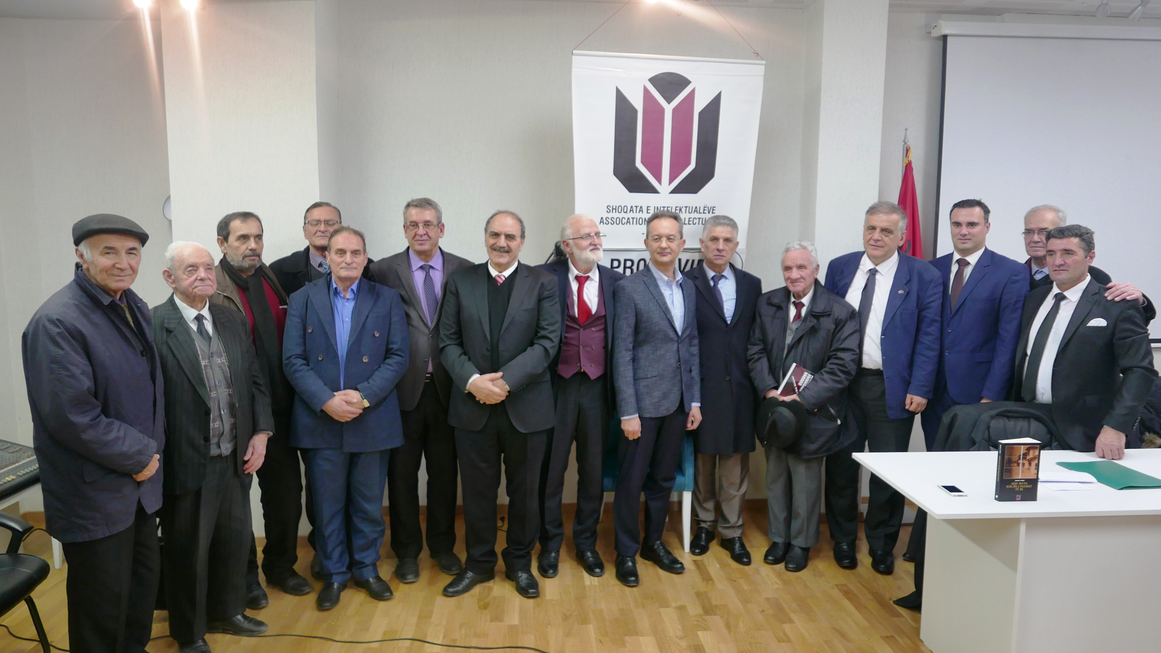 Në Gjakovë në Bibliotekën " Ibrahim Rugova" promovimi i librit Aqif Blyta : Kolosi i Pazarit të Ri, autorit Ismet Azizi